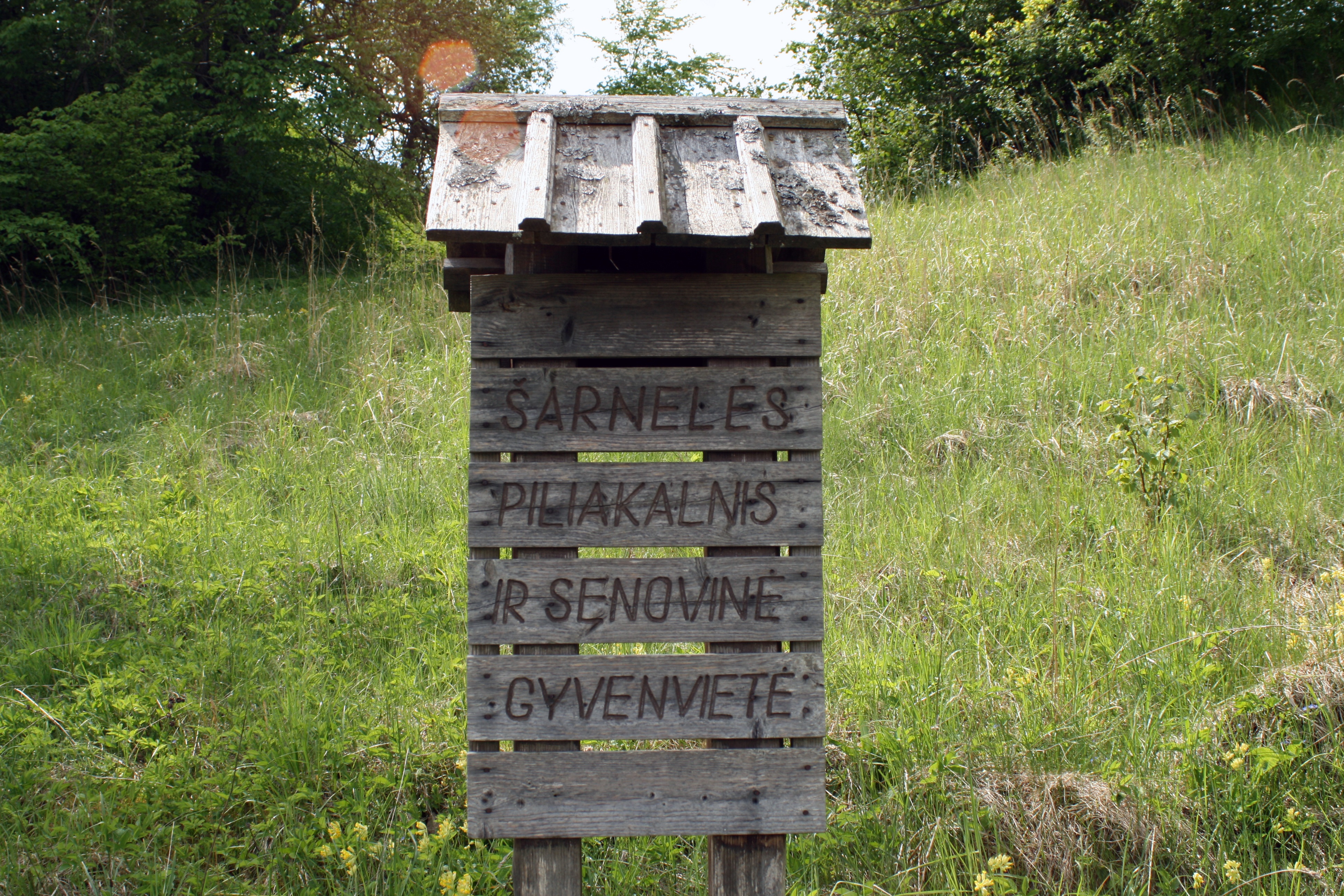 Šarnelės piliakalnis. Informacinė lenta